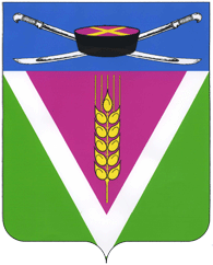 Герб станицы Новолеушковская Павловского района Краснодарского края